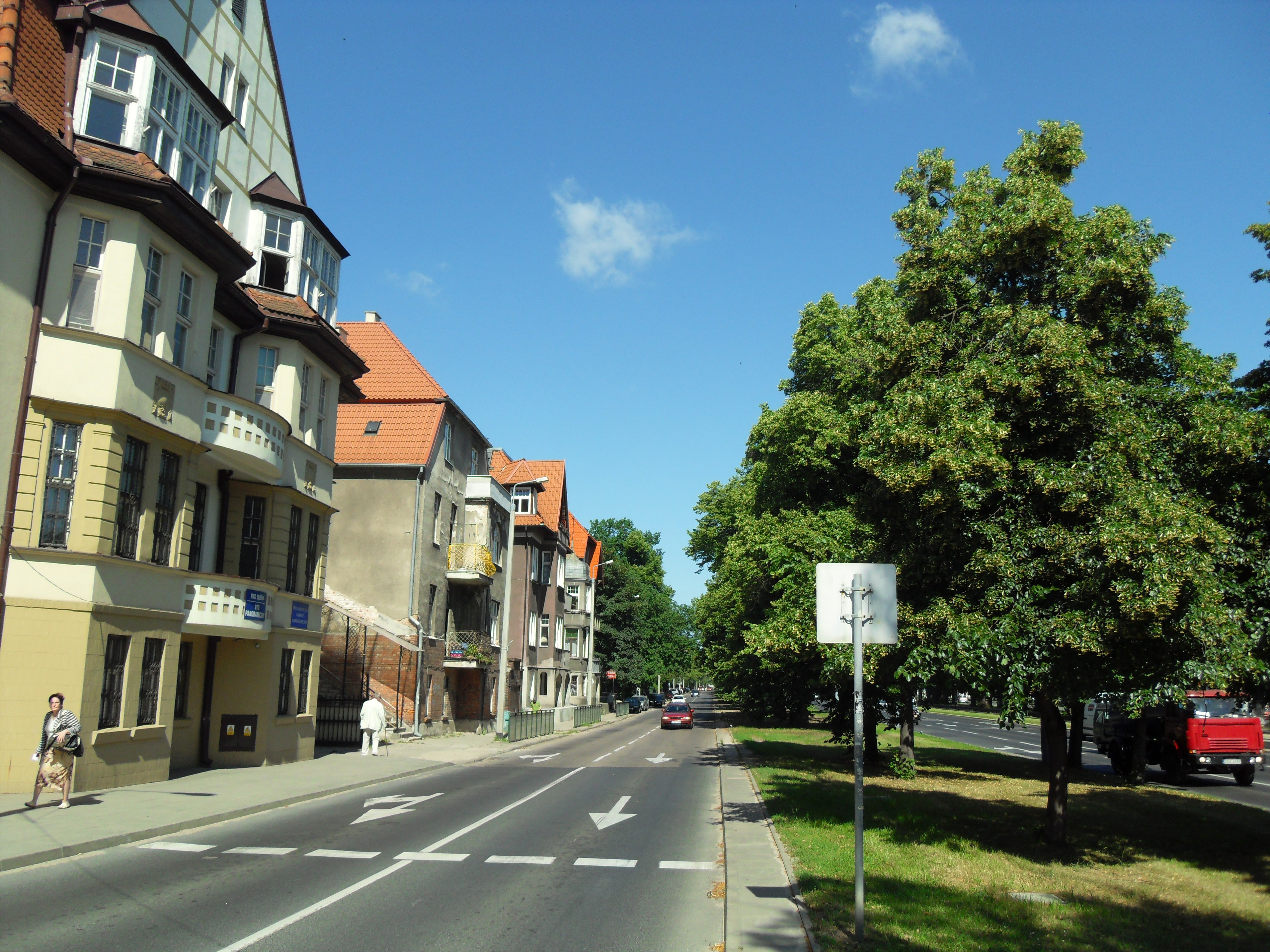 Gdańsk Aniołki. Trakt Konny (al. Zwycięstwa).